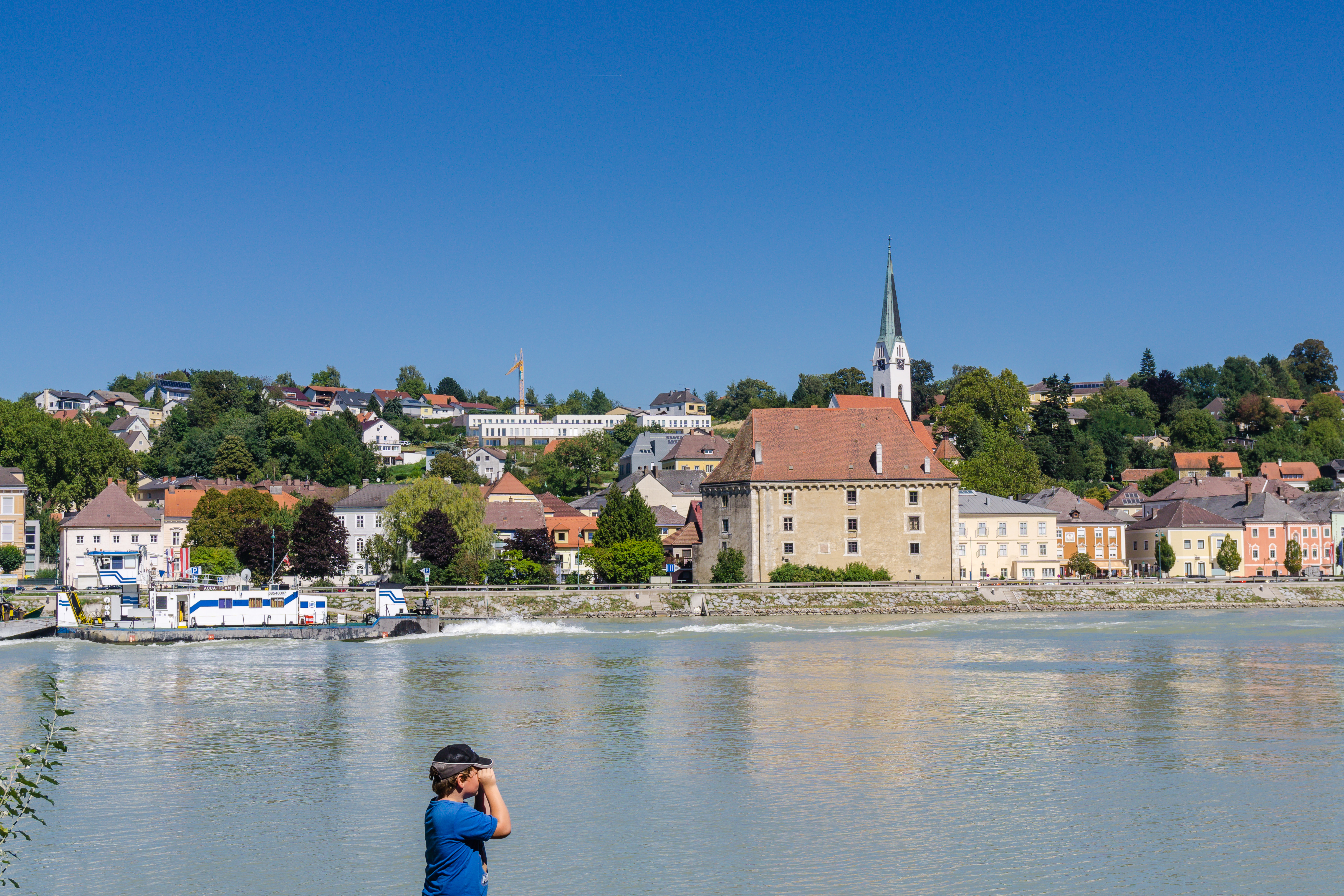 Donaufähre Enns-Mauthausen Blick vom Schiffsanleger Enns nach Mauthausen